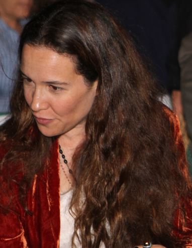 יעל אבקסיס בפסטיבל הסרטים ירושלים ב 2012